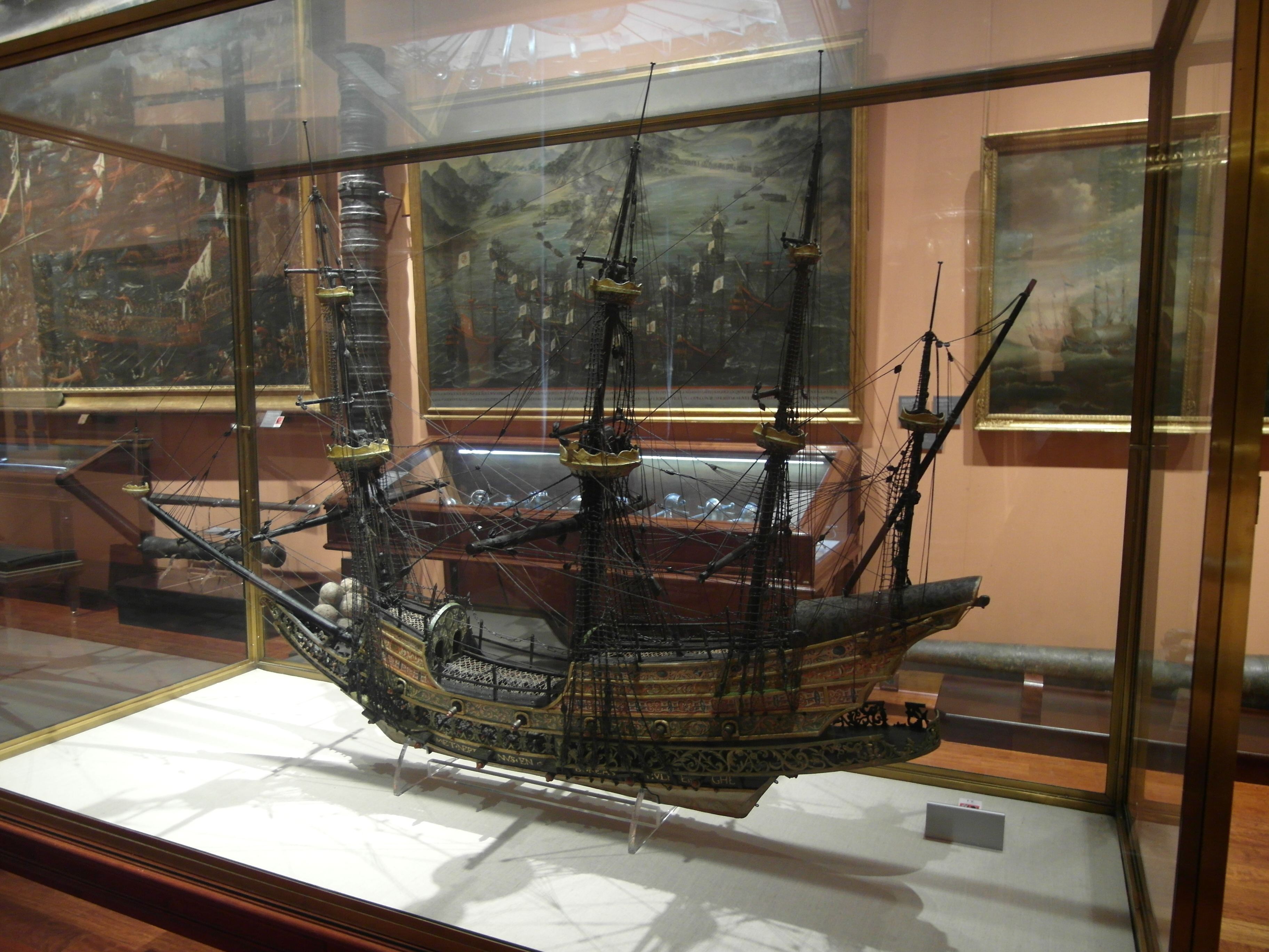 Maqueta de galeón flamenco de 1503, regalo a Felipe II de una embajada. Única maqueta tridimensional de un barco de la época. En el Museo Naval de Madrid.